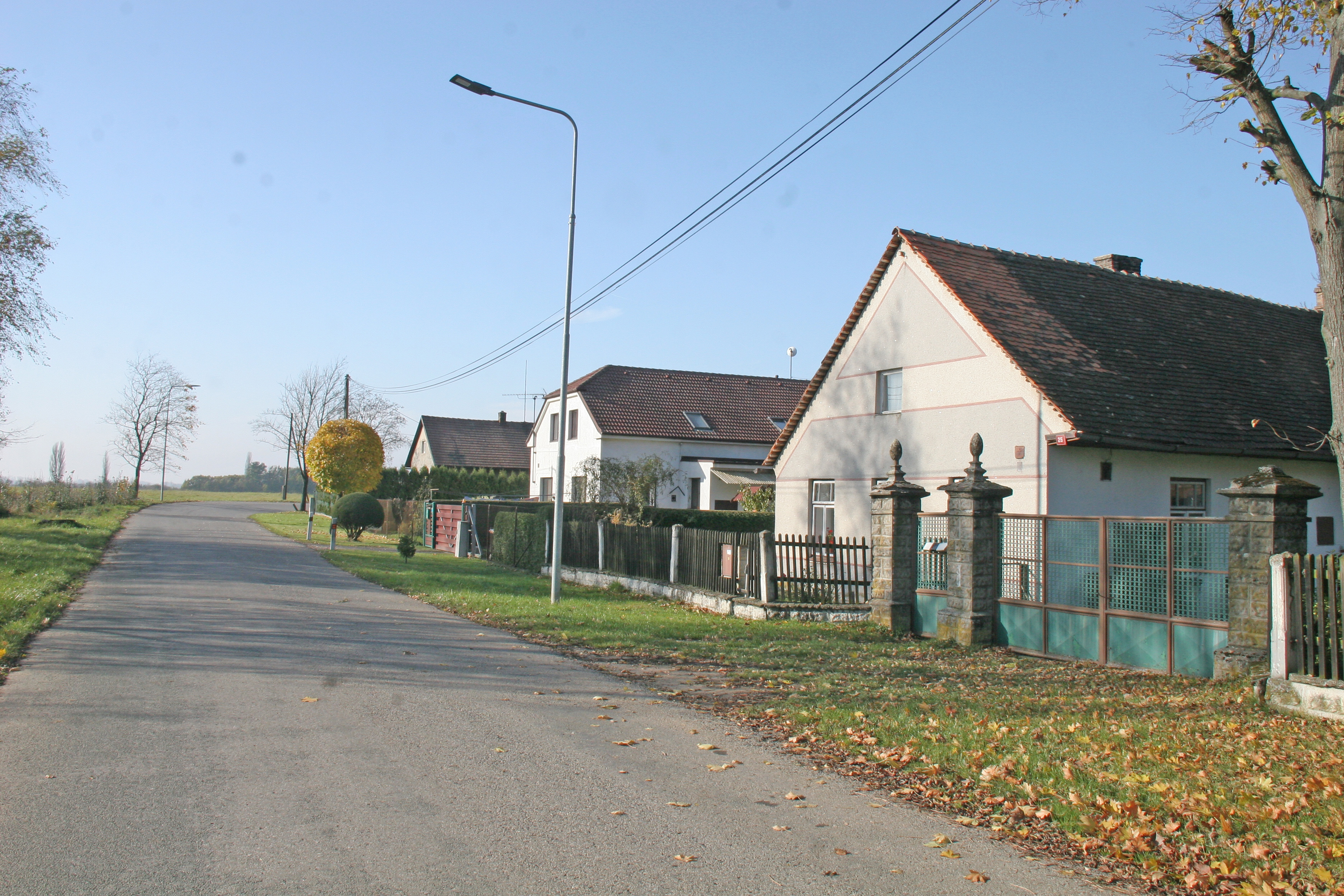 Roveňsko čp. 25